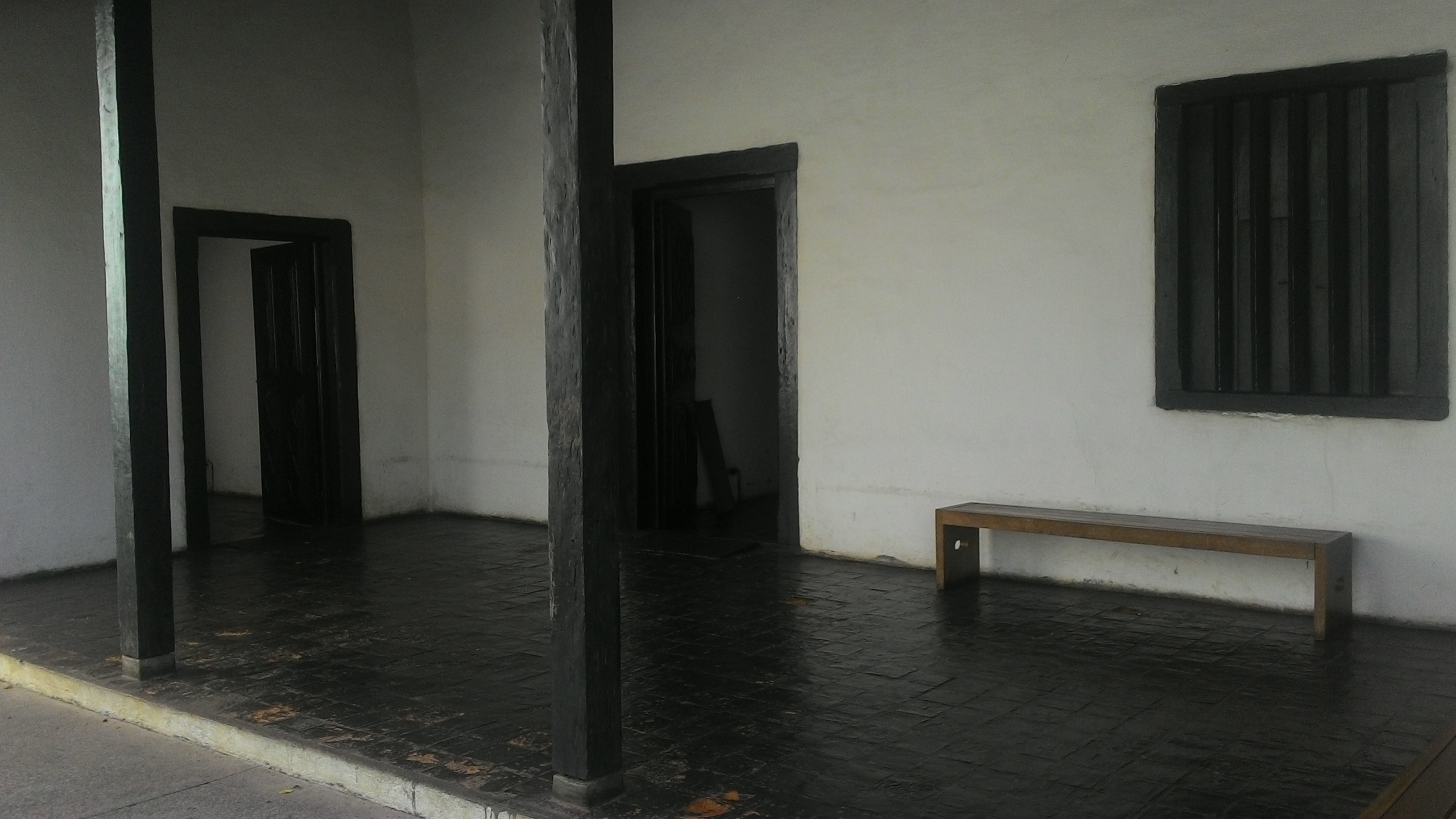 Área externa de uma das entradas da Casa do Sítio Tatuapé, em São Paulo (SP), Brasil.